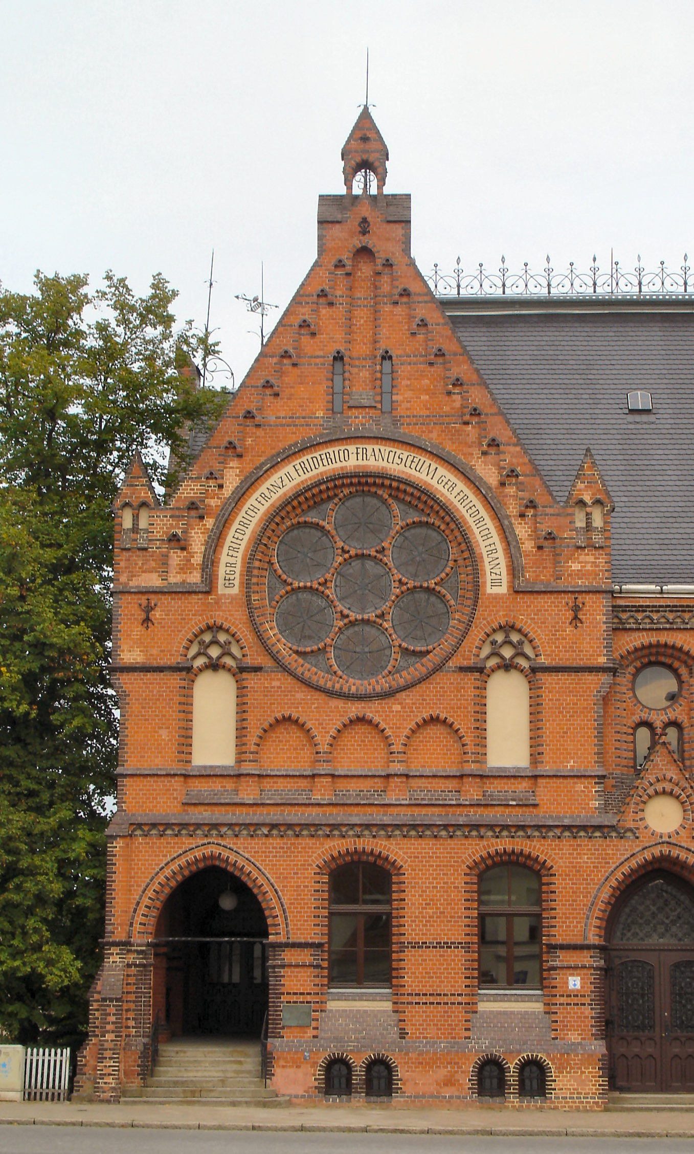 Detail Gymnasium Bad Doberan